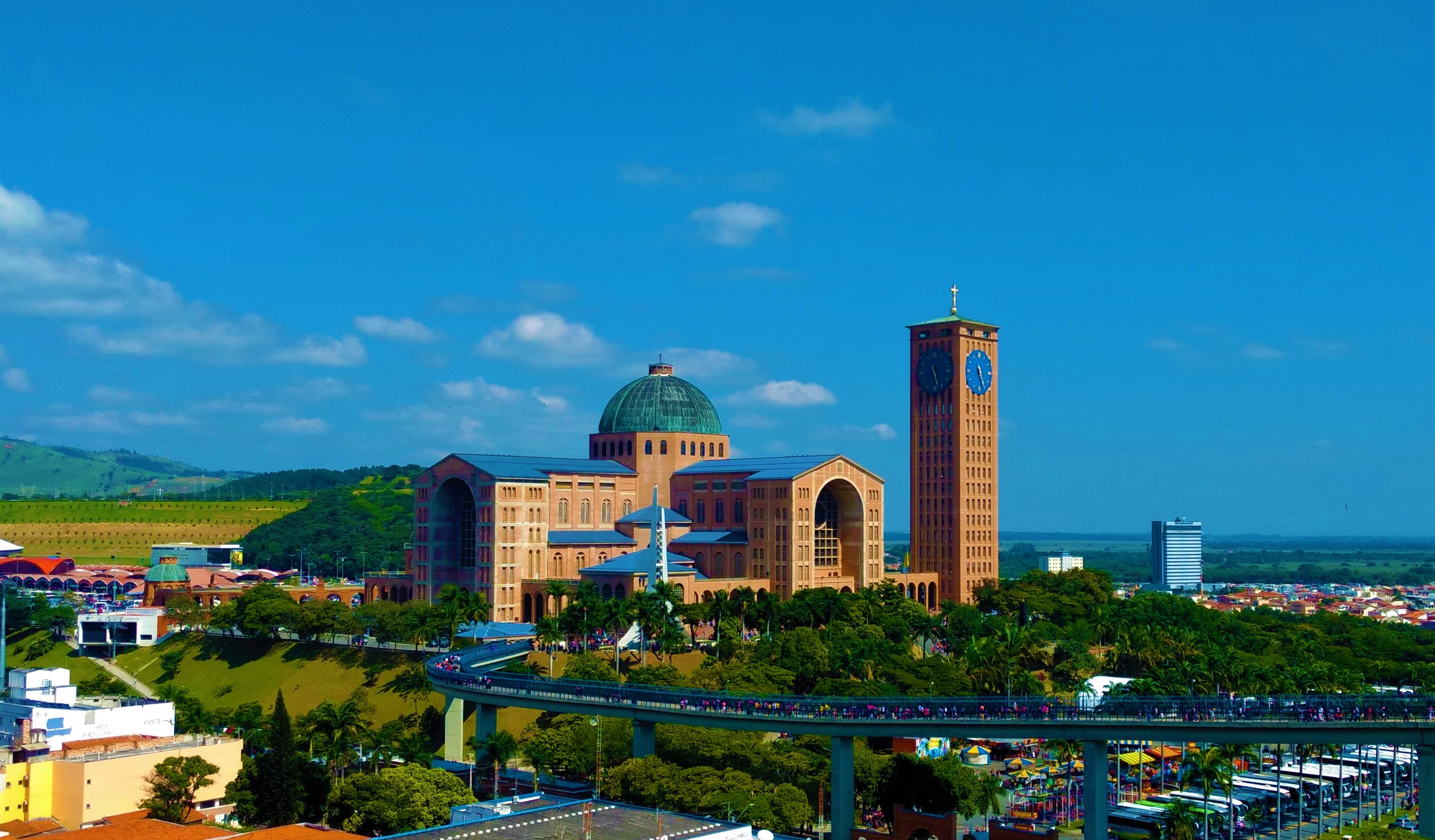 Vista alta lateral da Basílica. Cultural property Basilica of the National Shrine of Our Lady of Aparecida, Aparecida, São Paulo, Brazil Q2886950, iPatrimônio ID: aparecida-basilica-de-nossa-senhora-aparecida